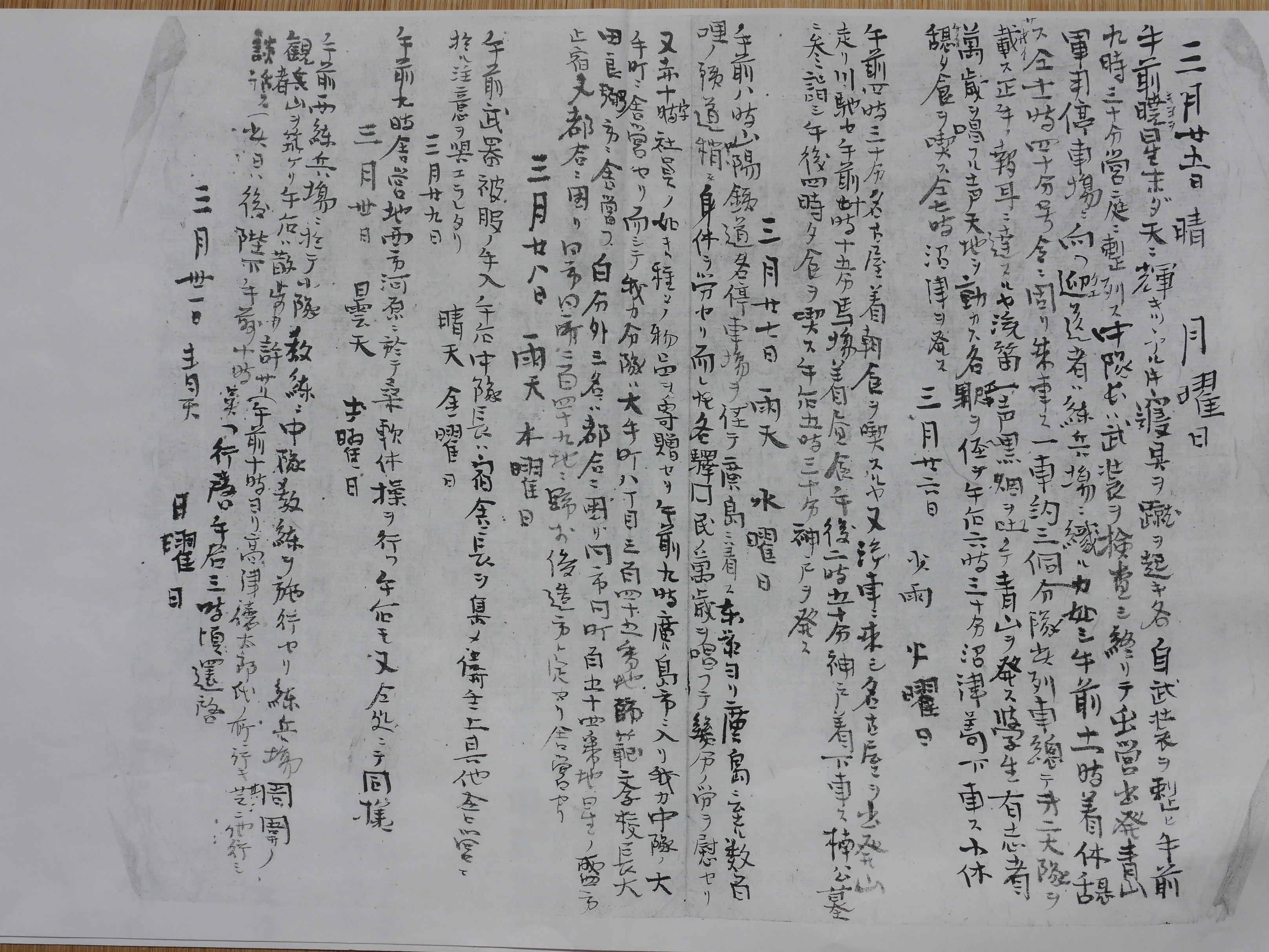 日清戦争出陣の日記